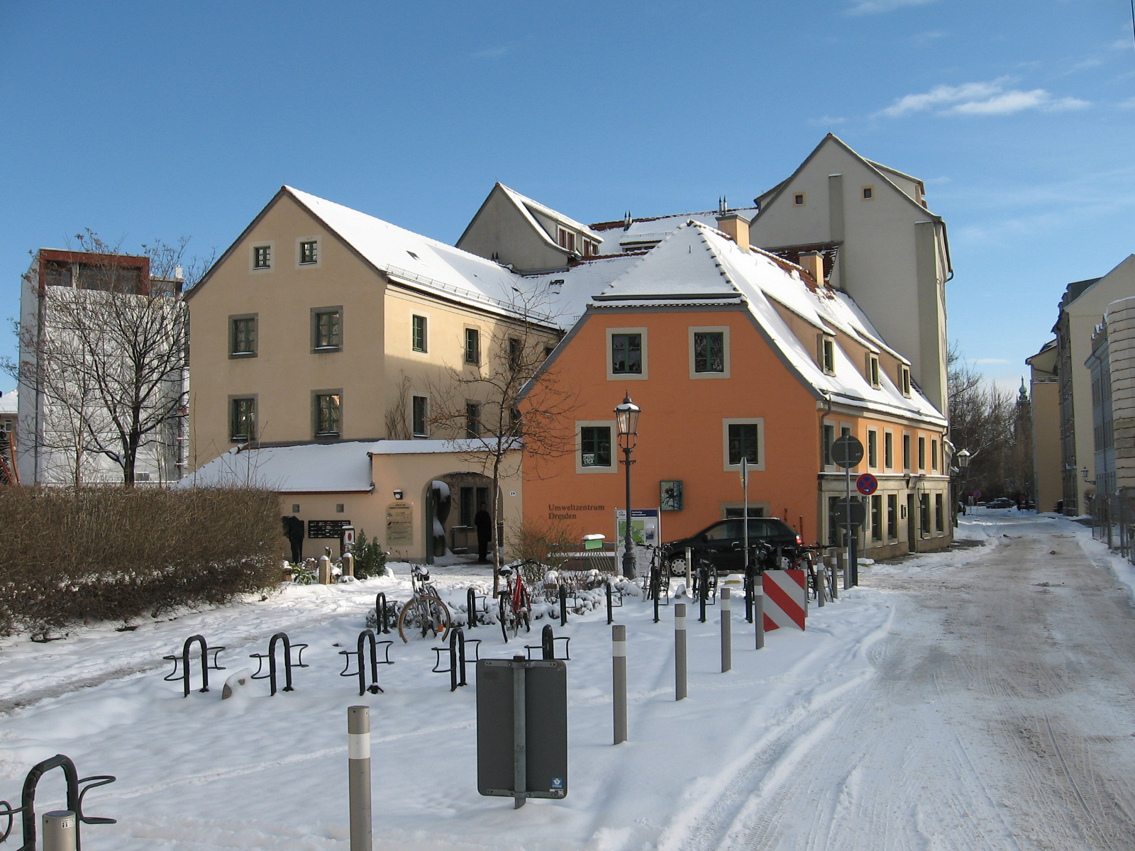 Das Umweltzentrum Dresden im Januar 2007